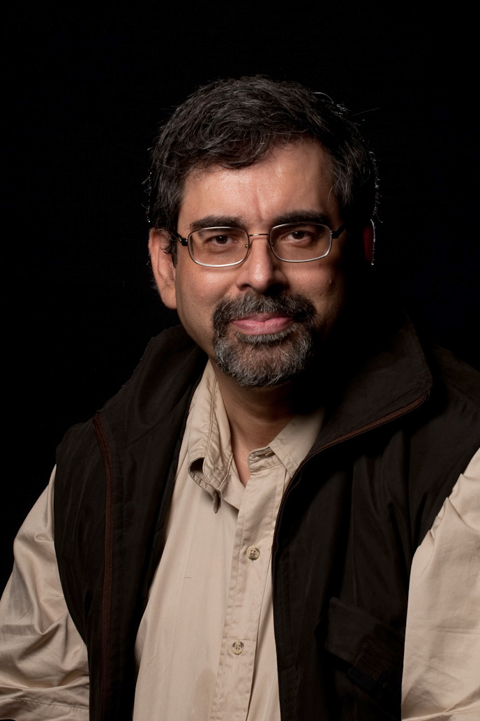 Atul Chitnis